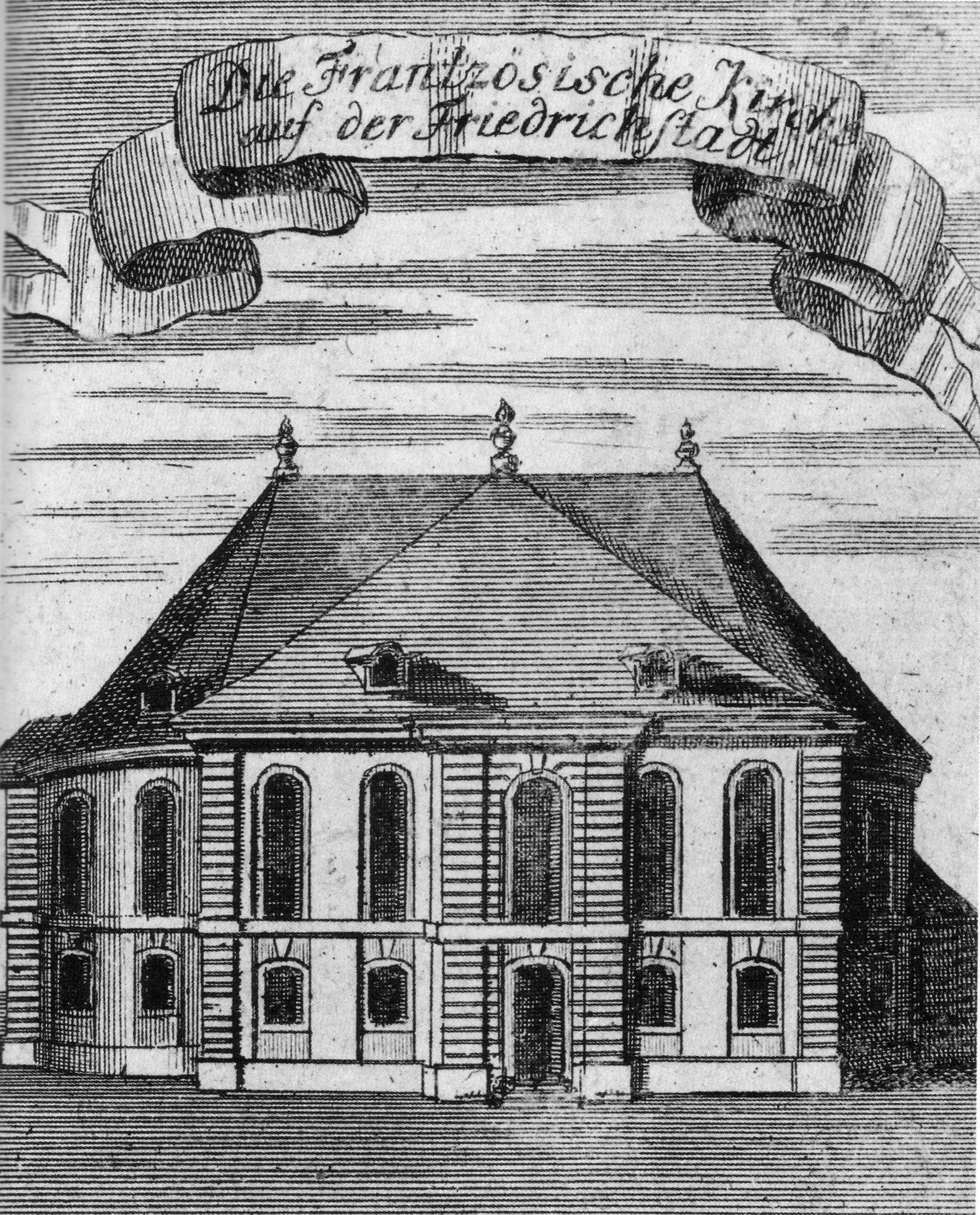 Franzoesische Kirche, (i. e. French Church). Berlin, Gendarmenmarkt.